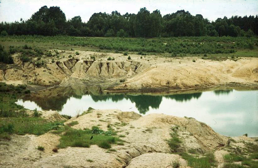 Aufgelassener Kieselgur-Tagebau, Neuohe, Lüneburger Heide, Niedersachsen, Deutschland